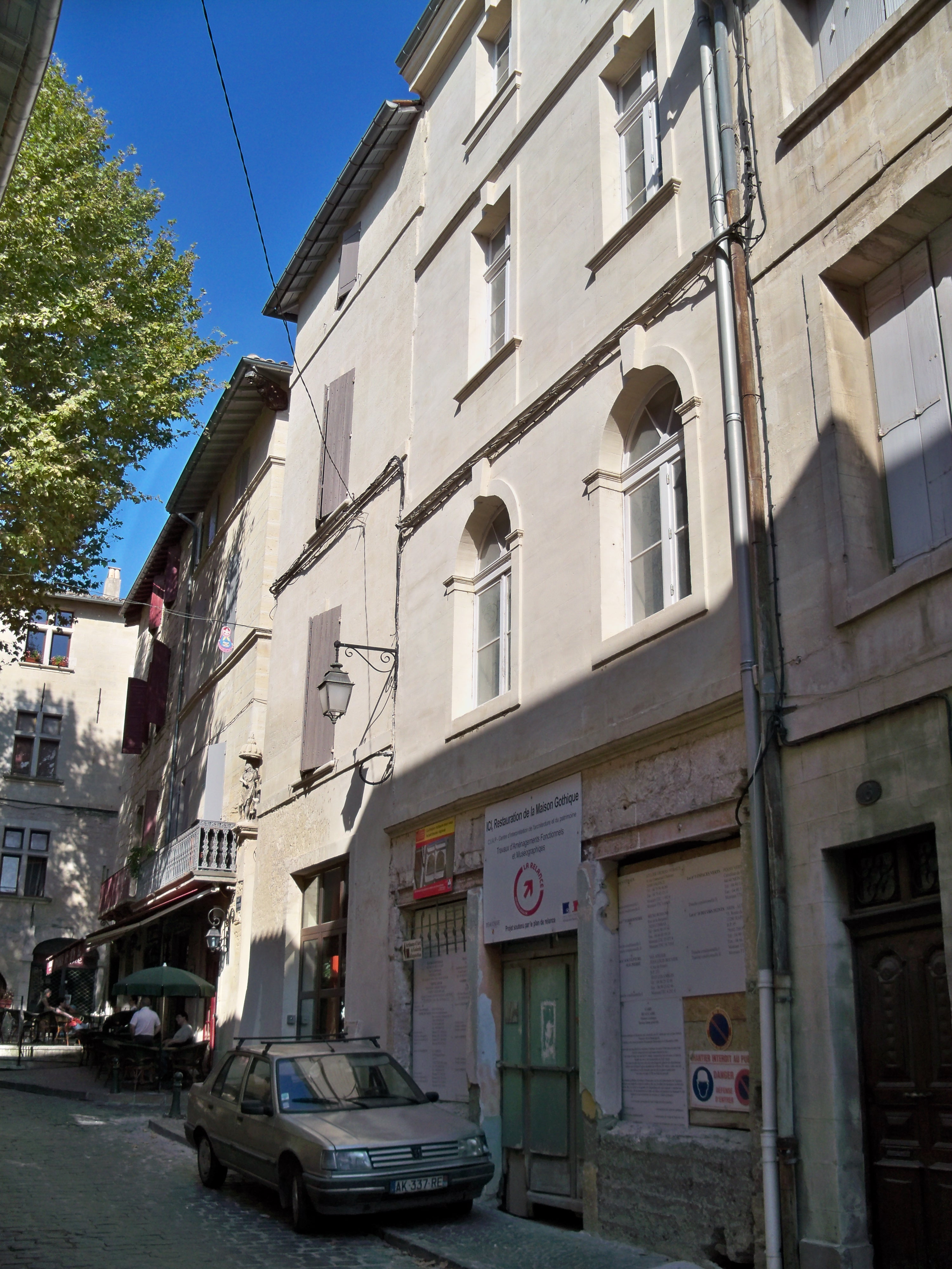 "Maison Gothique" à Beaucaire (Gard, France)